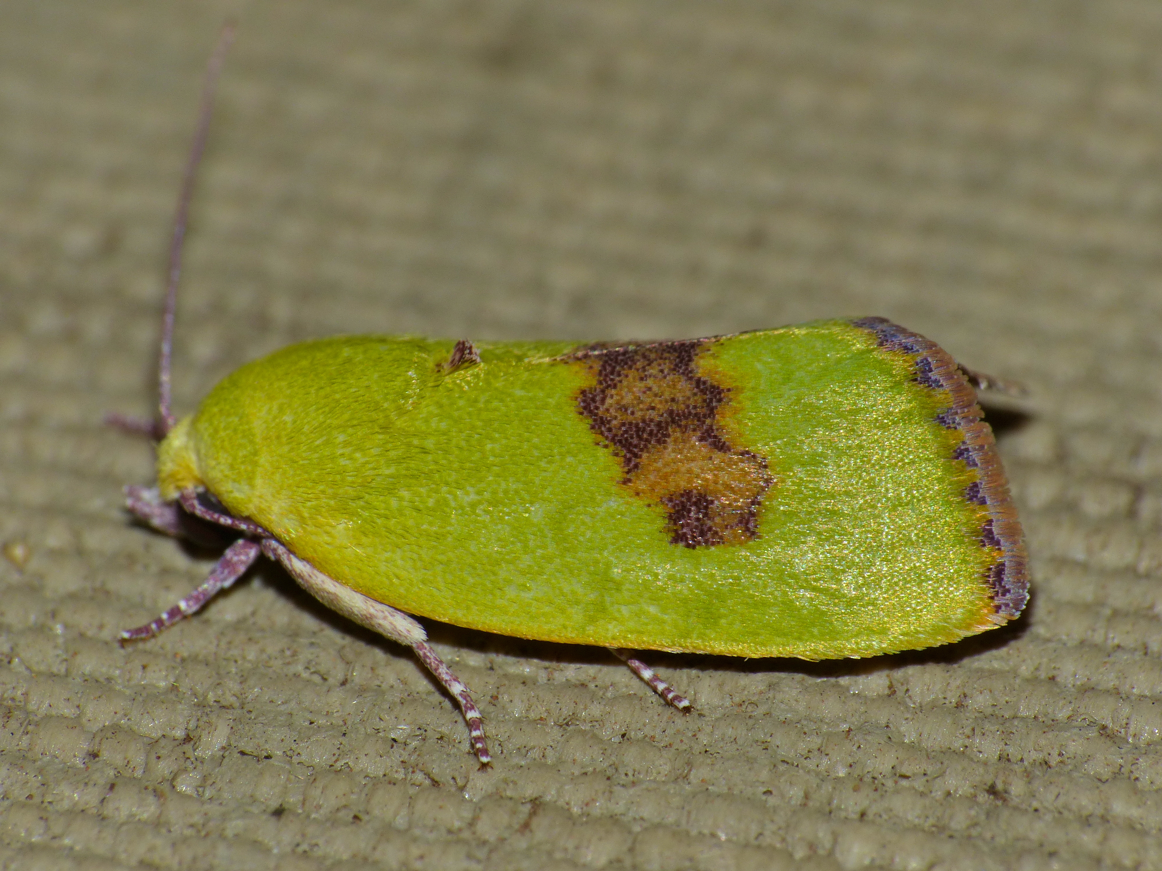 Safari Tent N°12, Lower Sabie Camp, Kruger NP, SOUTH AFRICA